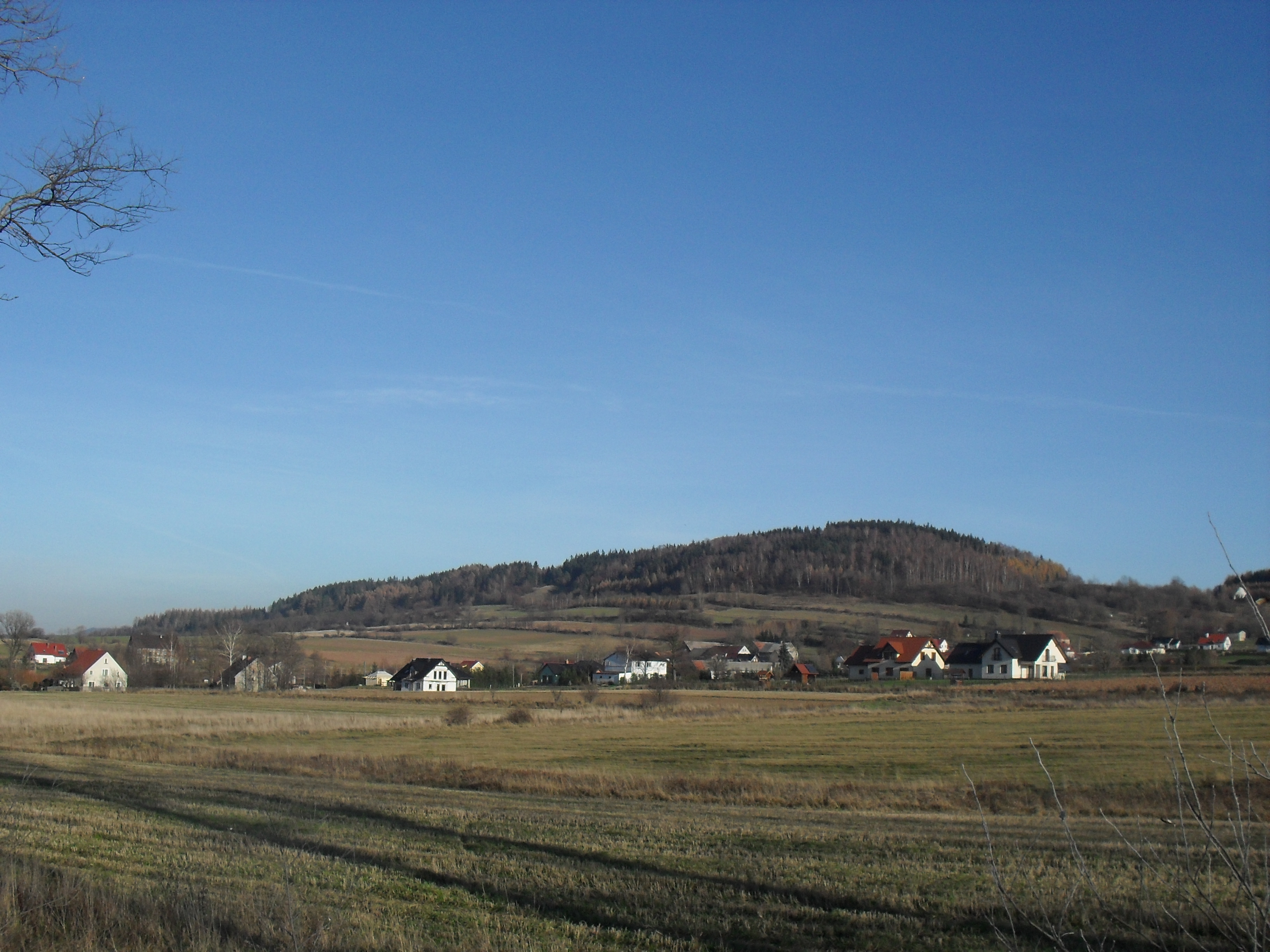 Długosz. Panorama Przedwojowa